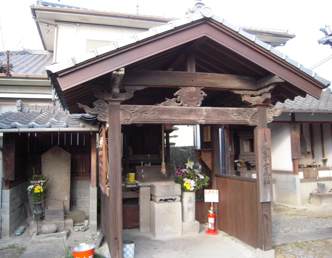 熊本県八代市の医王寺(足手荒神)